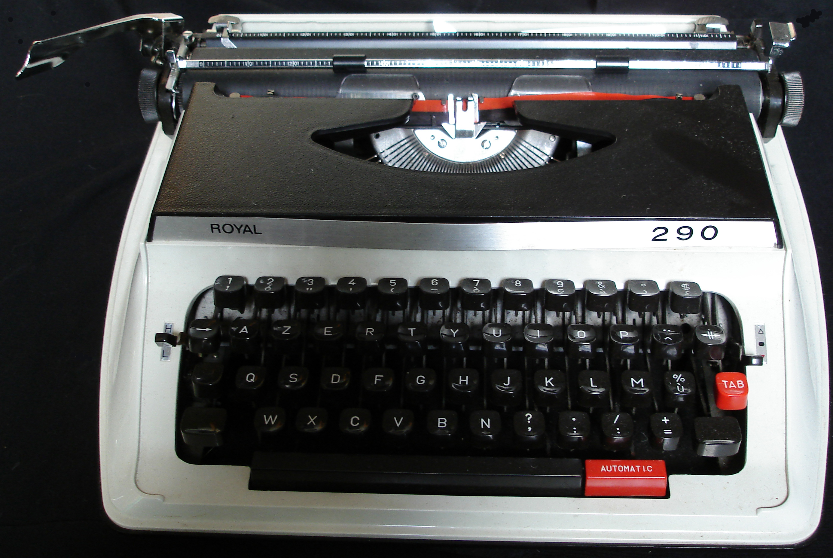 Write machine Machine à écrire